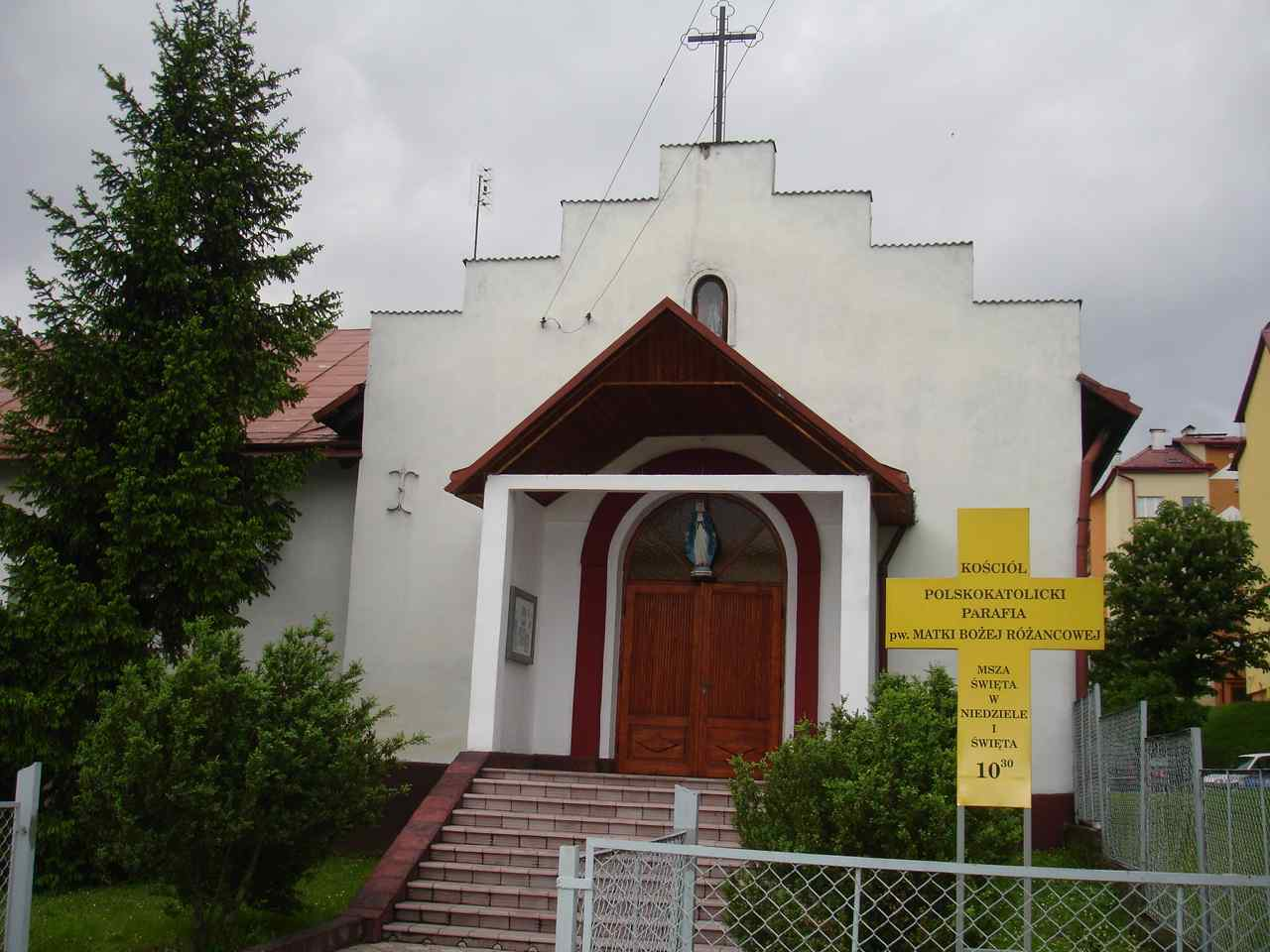 Kościół polskokatolicki Parafia pw. Matki Bożej Różańcowej w Sanoku.